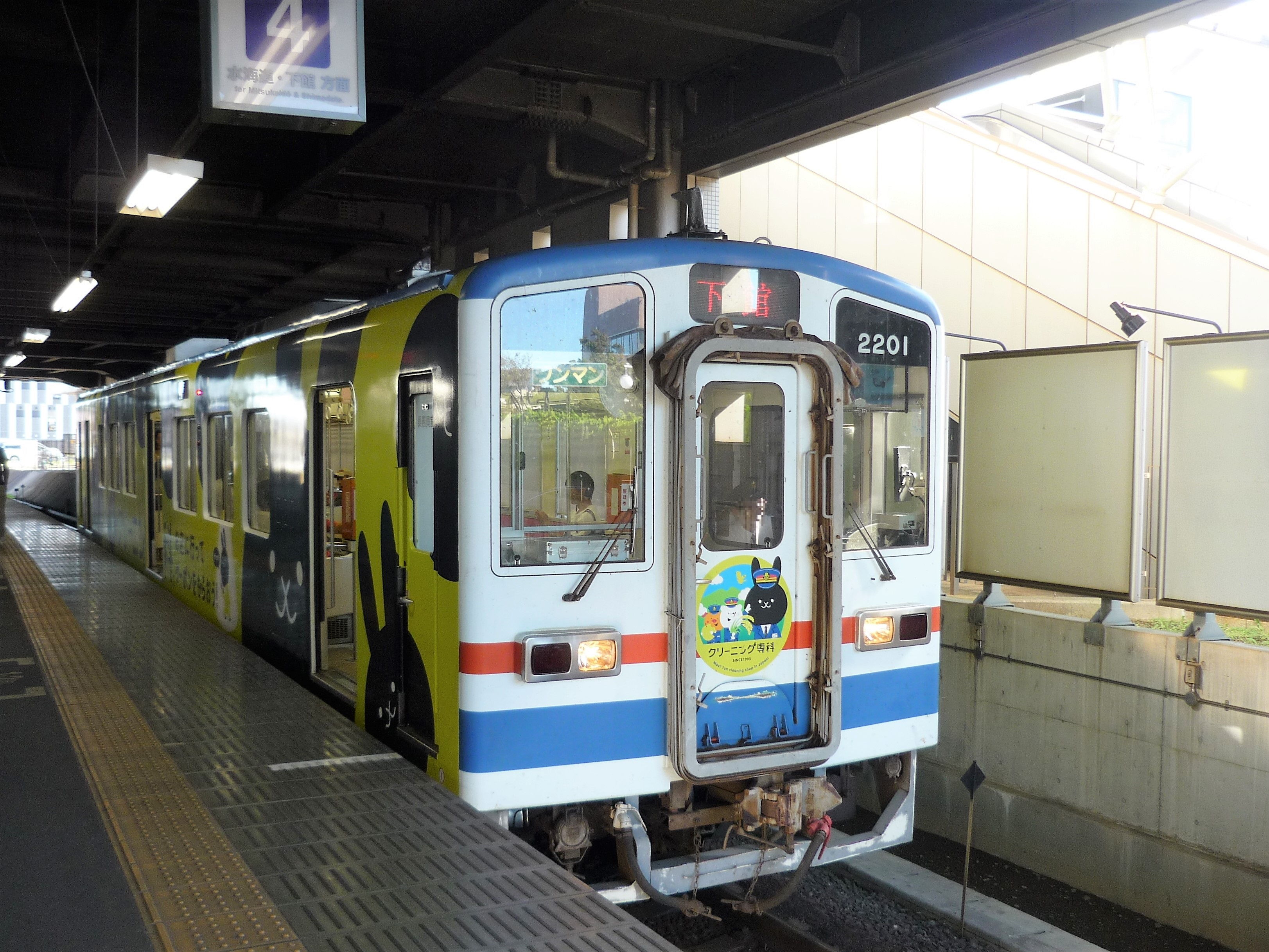 守谷駅4番線に停車中の関東鉄道キハ2200形2201 Panasonic Lumix DMC-FS3